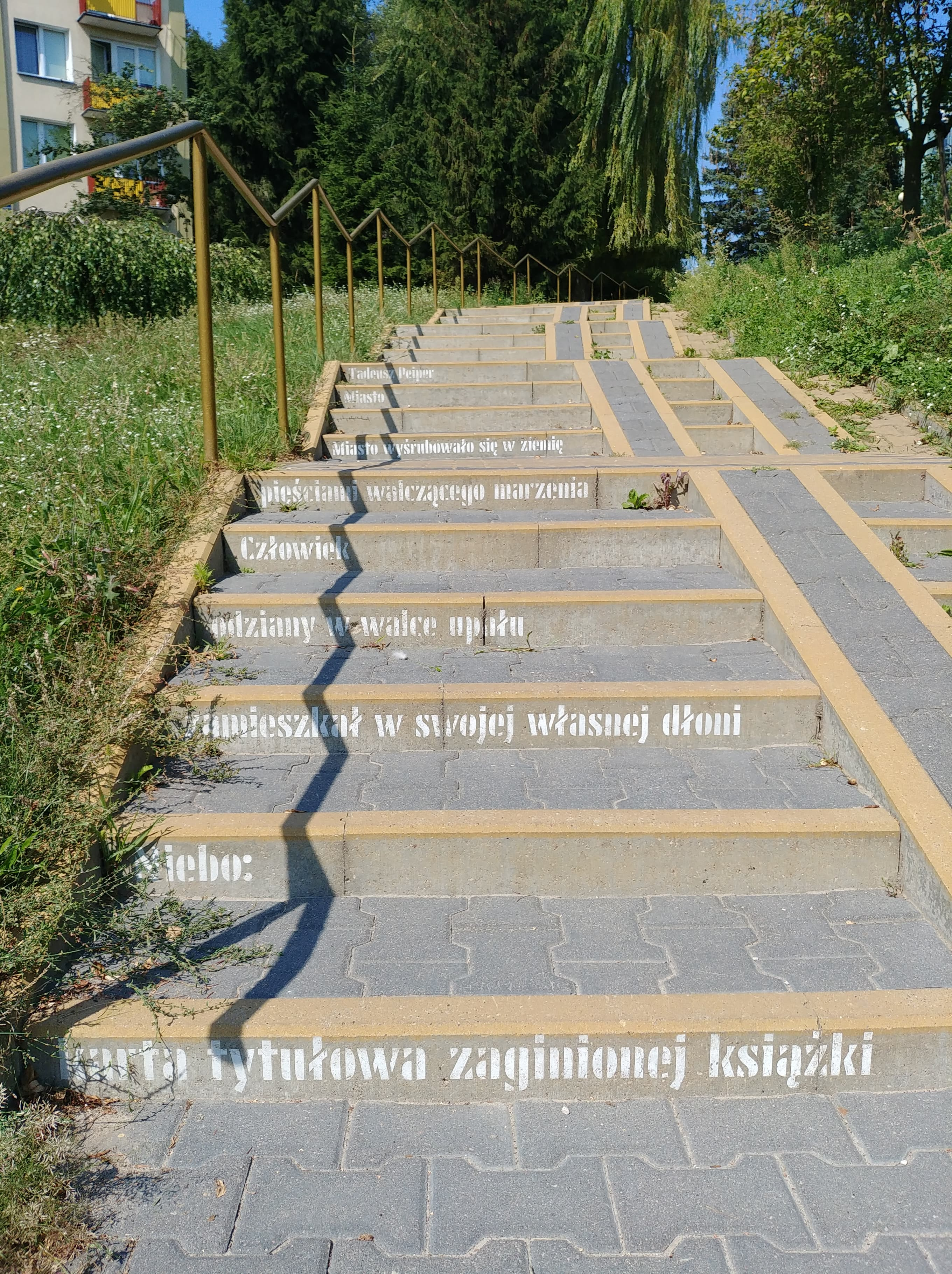 Podstopnice schodów z namalowanym wierszem Tadeusza Peipera "Miasto" z okazji Miasta Poezji 2019